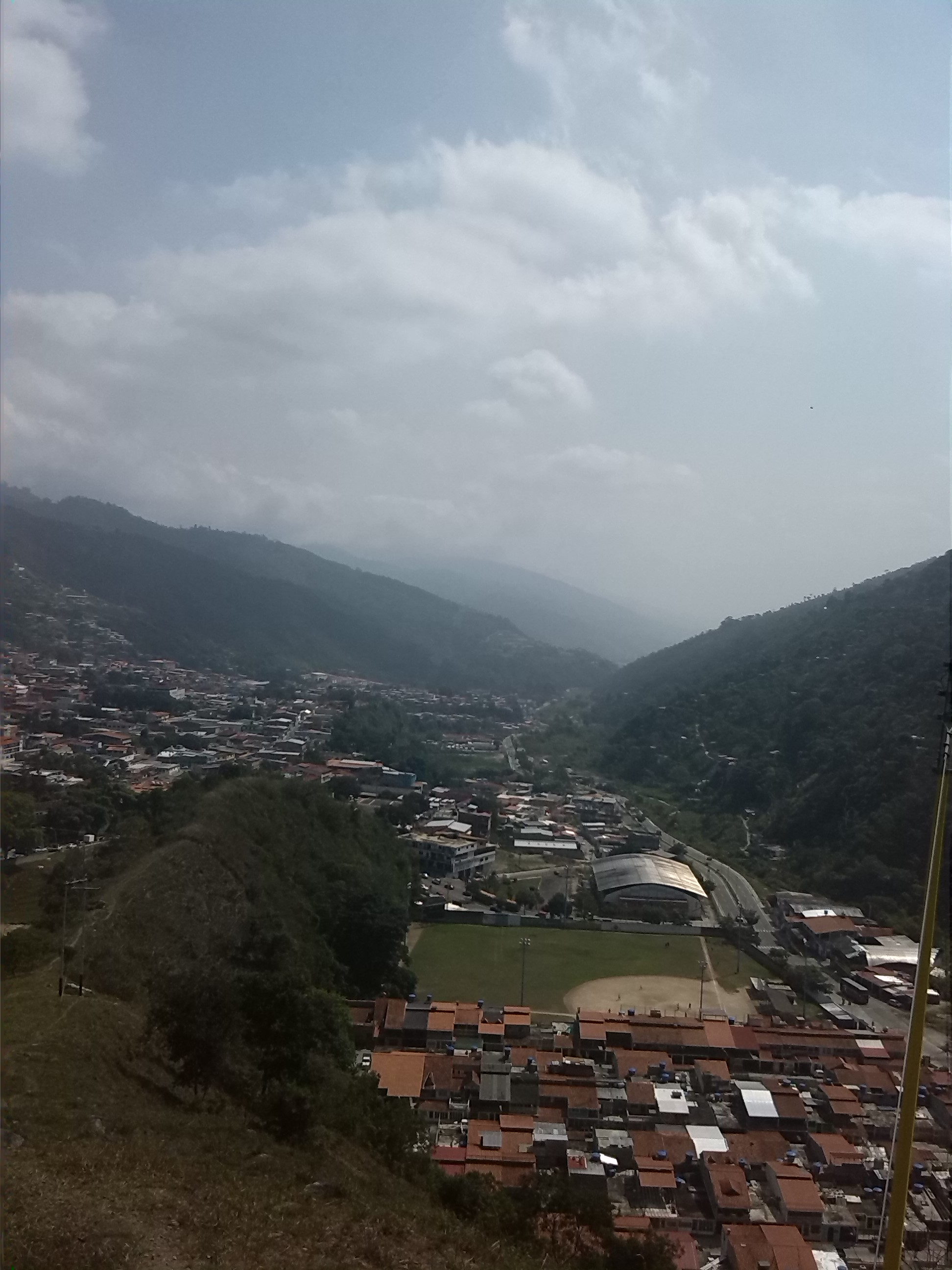 paisaje